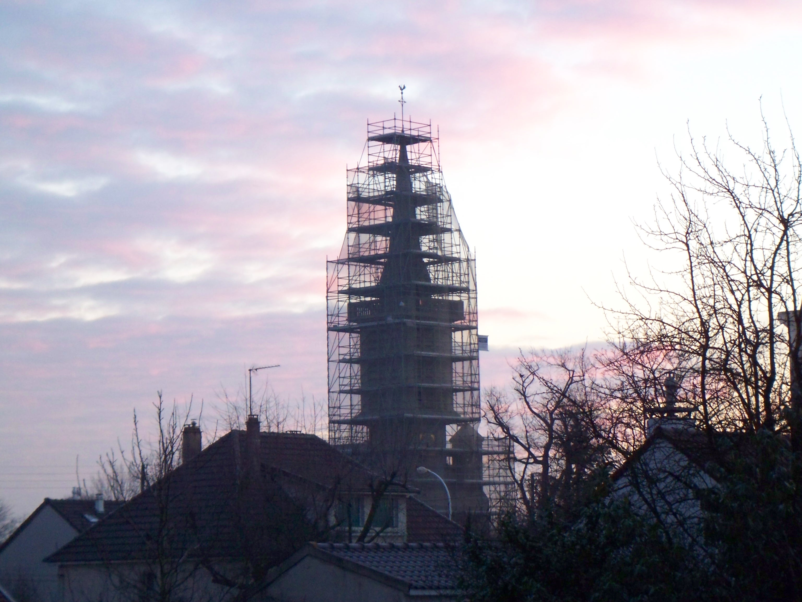 Église Notre-Dame-de-l'Assomption : Rénovation exterieure de 2006-2007